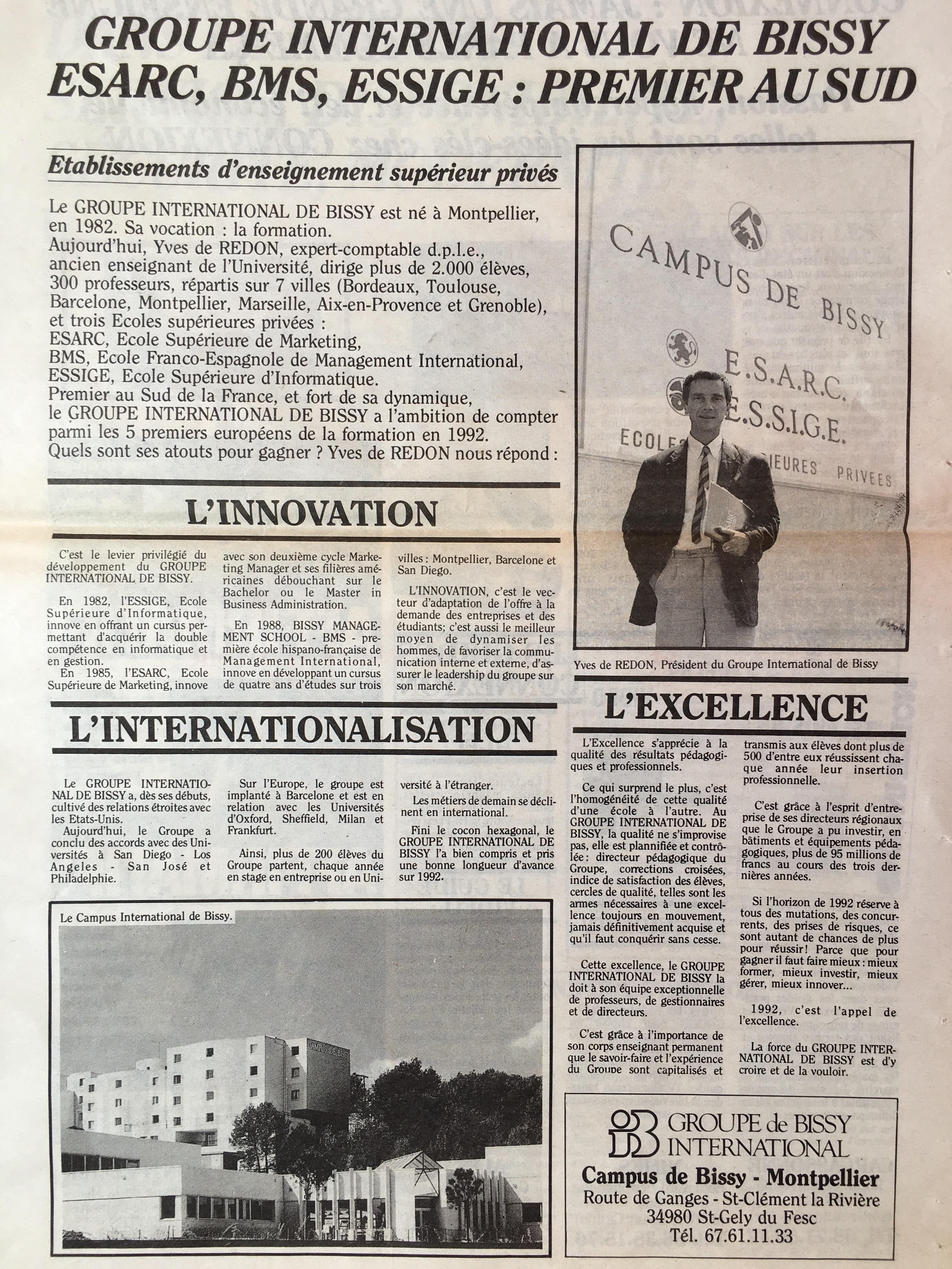 Article de presse.